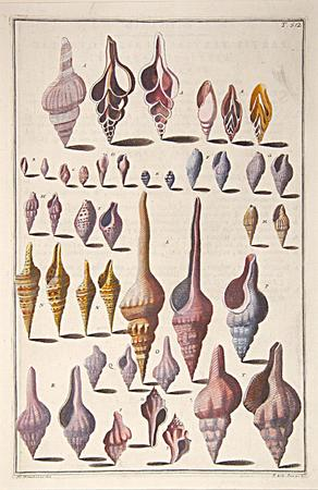 Coquillages, gravures de Menabuoni Pazzi